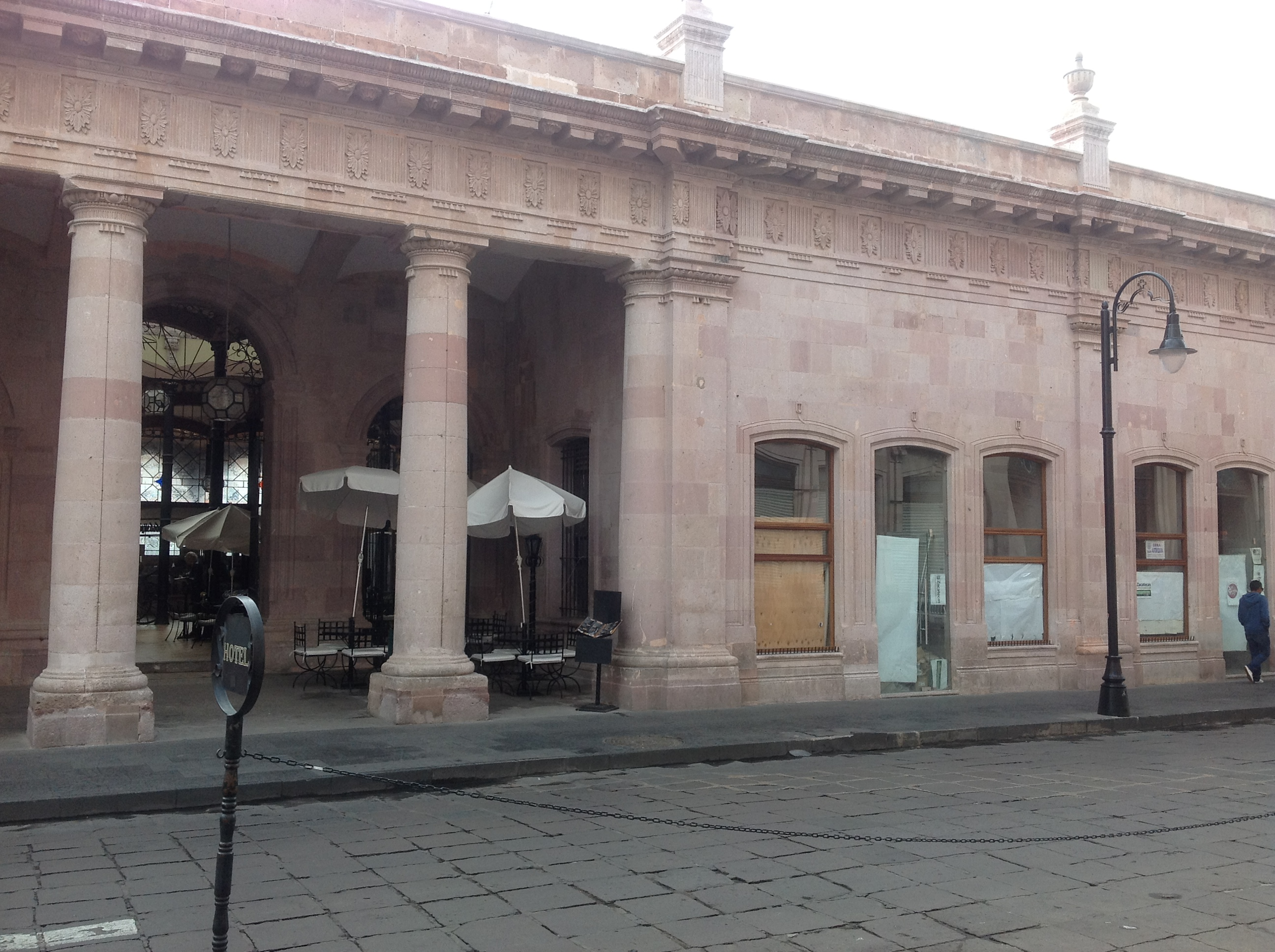 El mercado